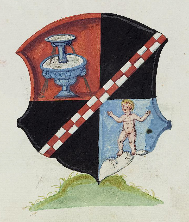 Wappen aus: David Wolleber: Chorographia Württemberg, [Schorndorf] 1591, Universitätsbibliothek Tübingen, Mh 6,1Wappen Kloster Königsbronn